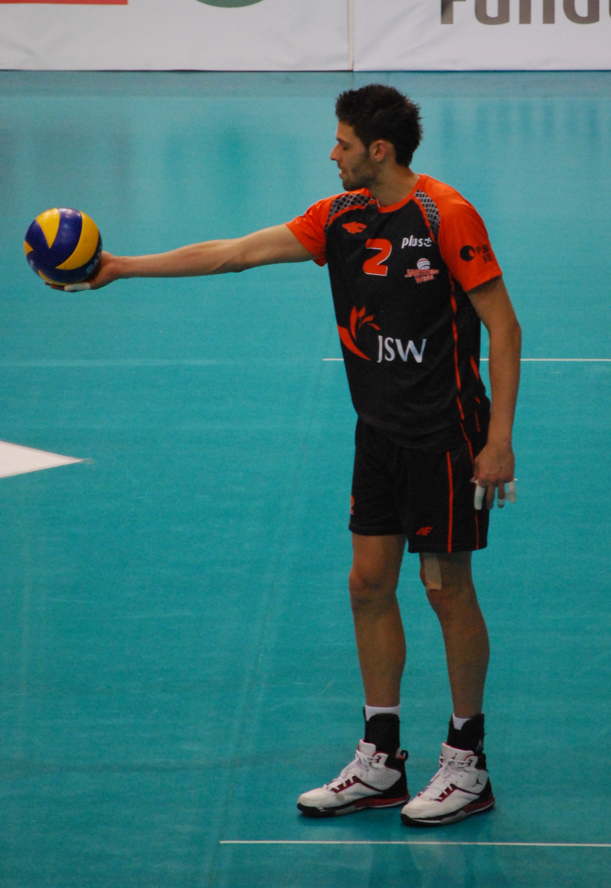 Lukáš Diviš